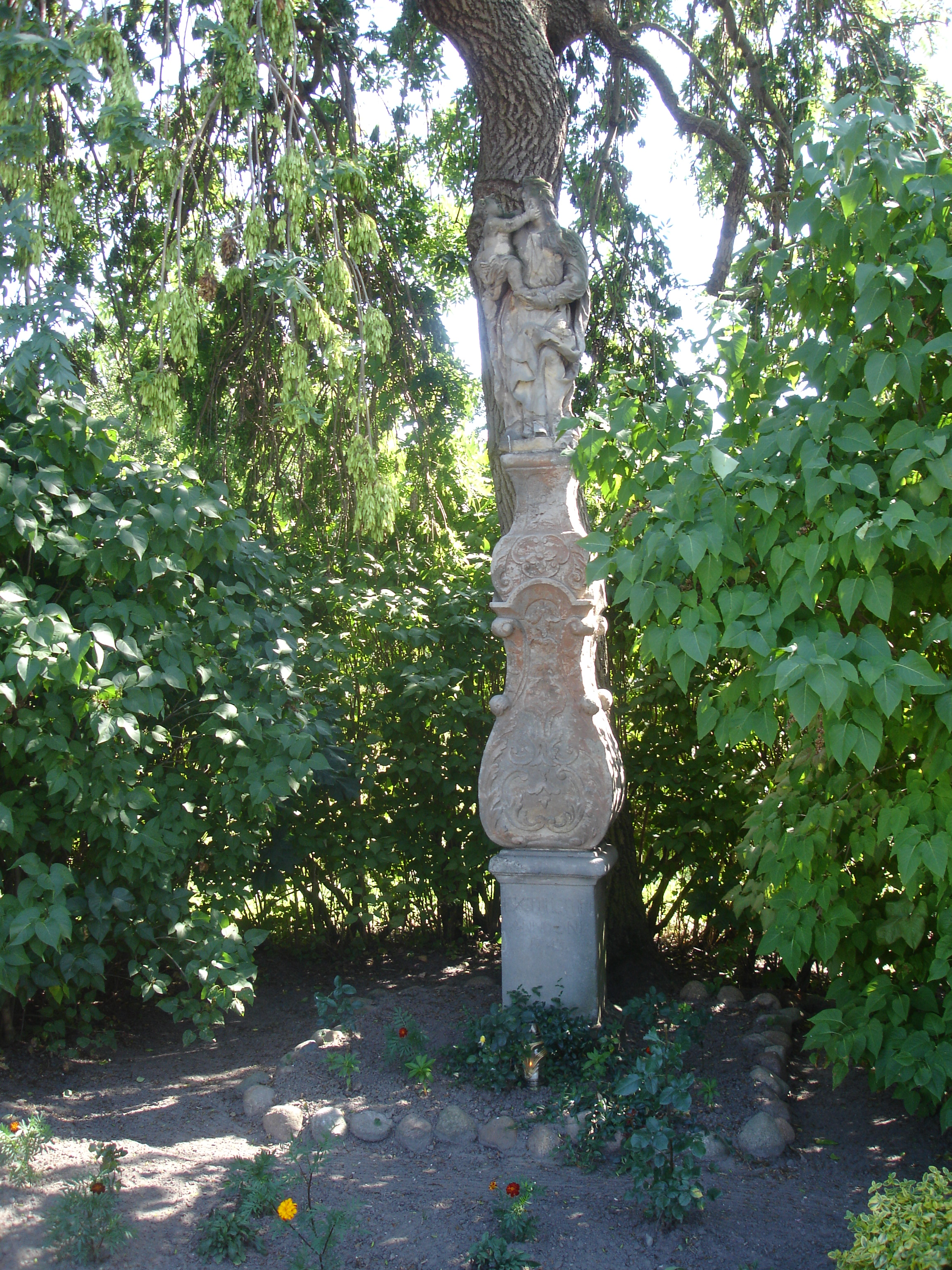 Figura świetego Józefa w Pawłowicach z 1743